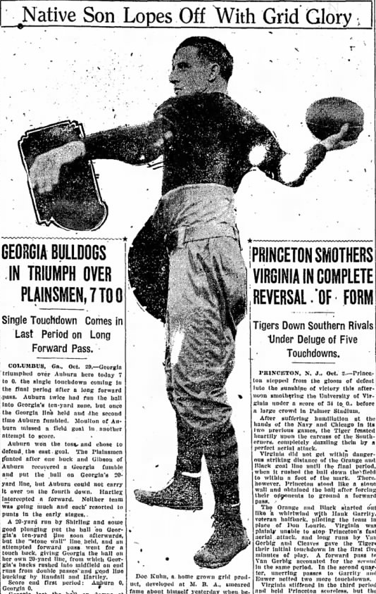 Vanderbilt quarterback Doc Kuhn